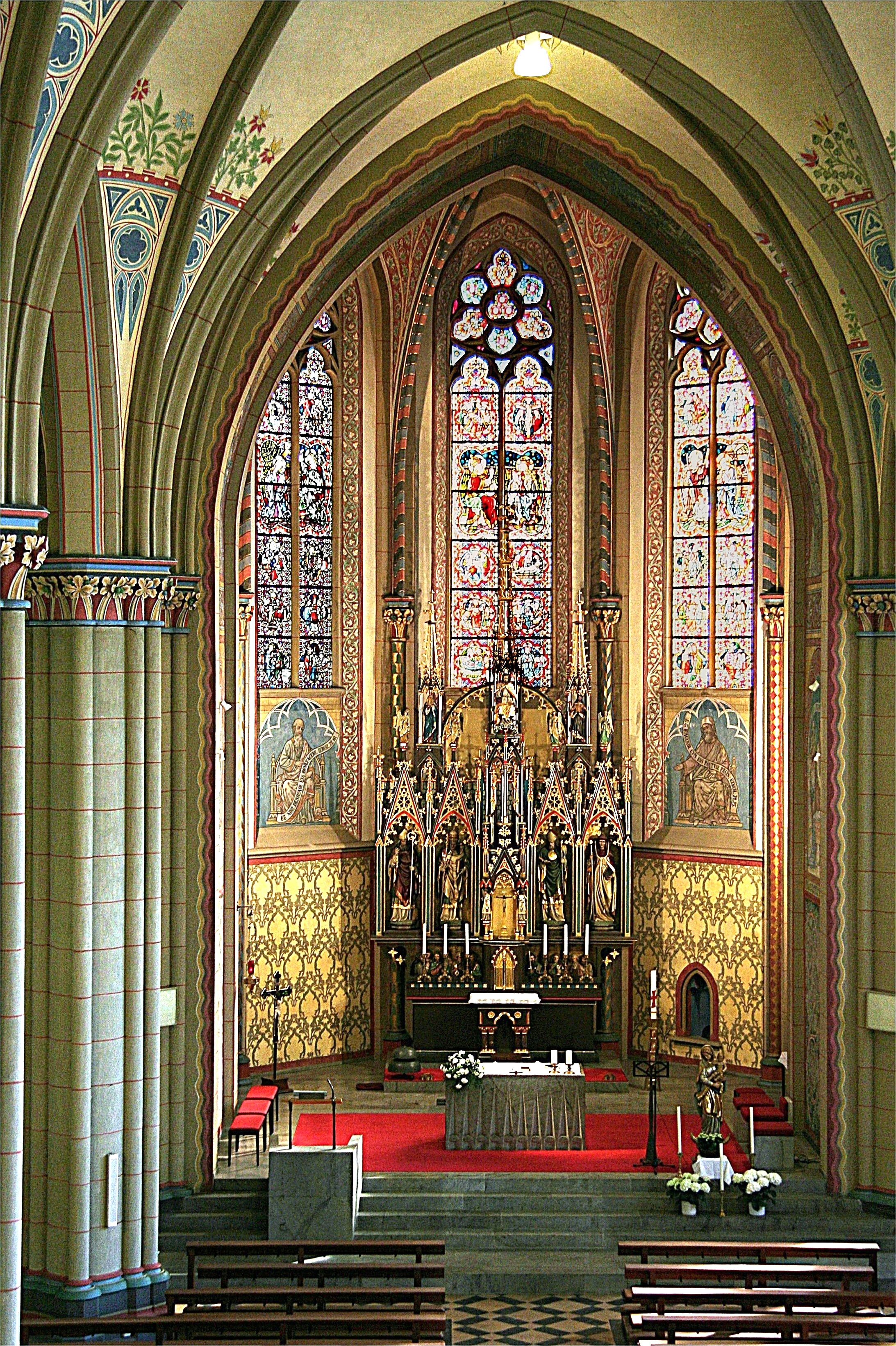 Pfarrkirche Maria Himmelfahrt Mülheim, Chorraum mit Altar